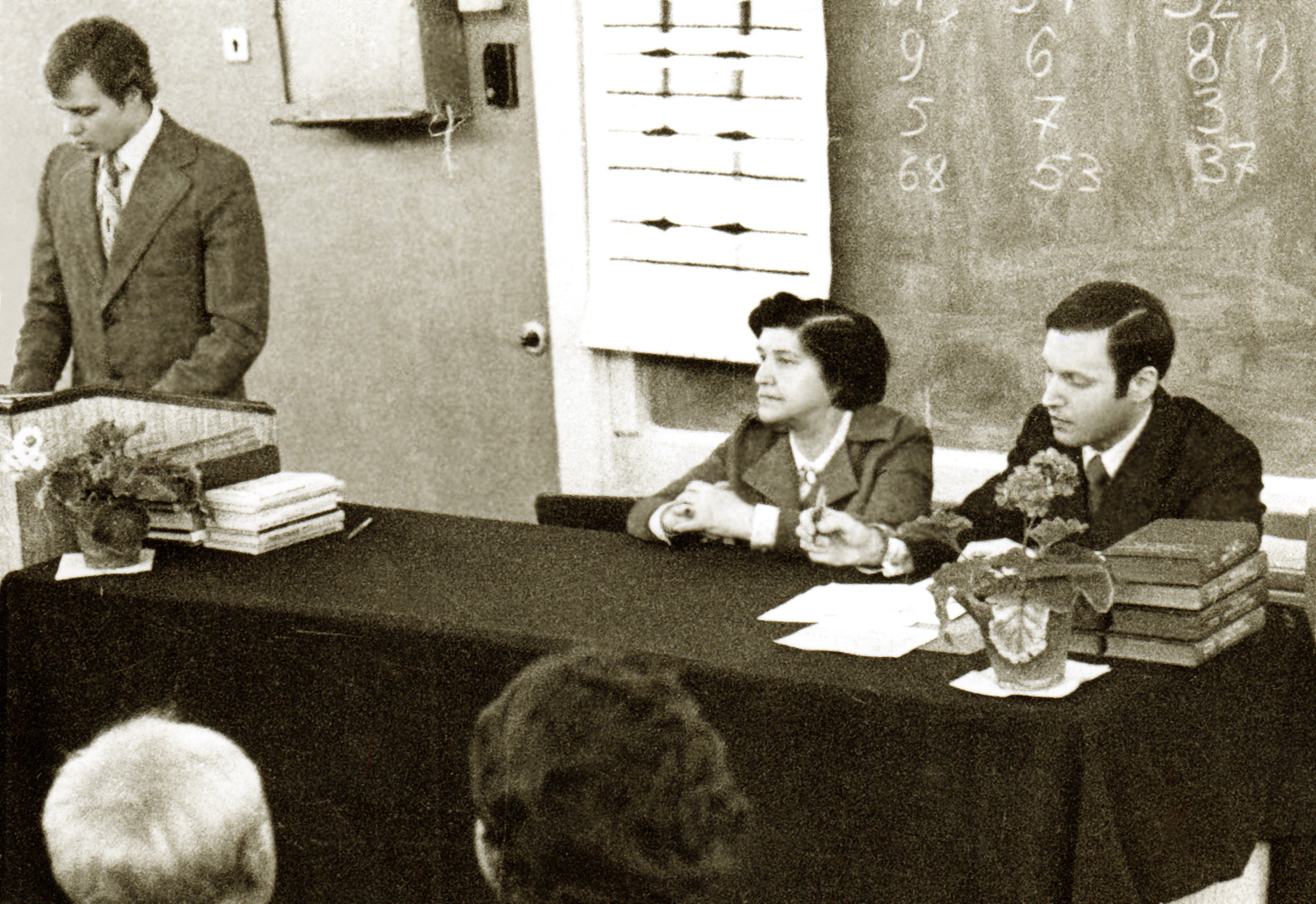 Конференция СНО ЛПМИ. В президиуме ректор института, профессор Г. А. Тимофеева и научный руководитель совета СНО, профессор В. А. Гусель. За трибуной студент 6-го курса хирургической группы Юрий Сёмкин